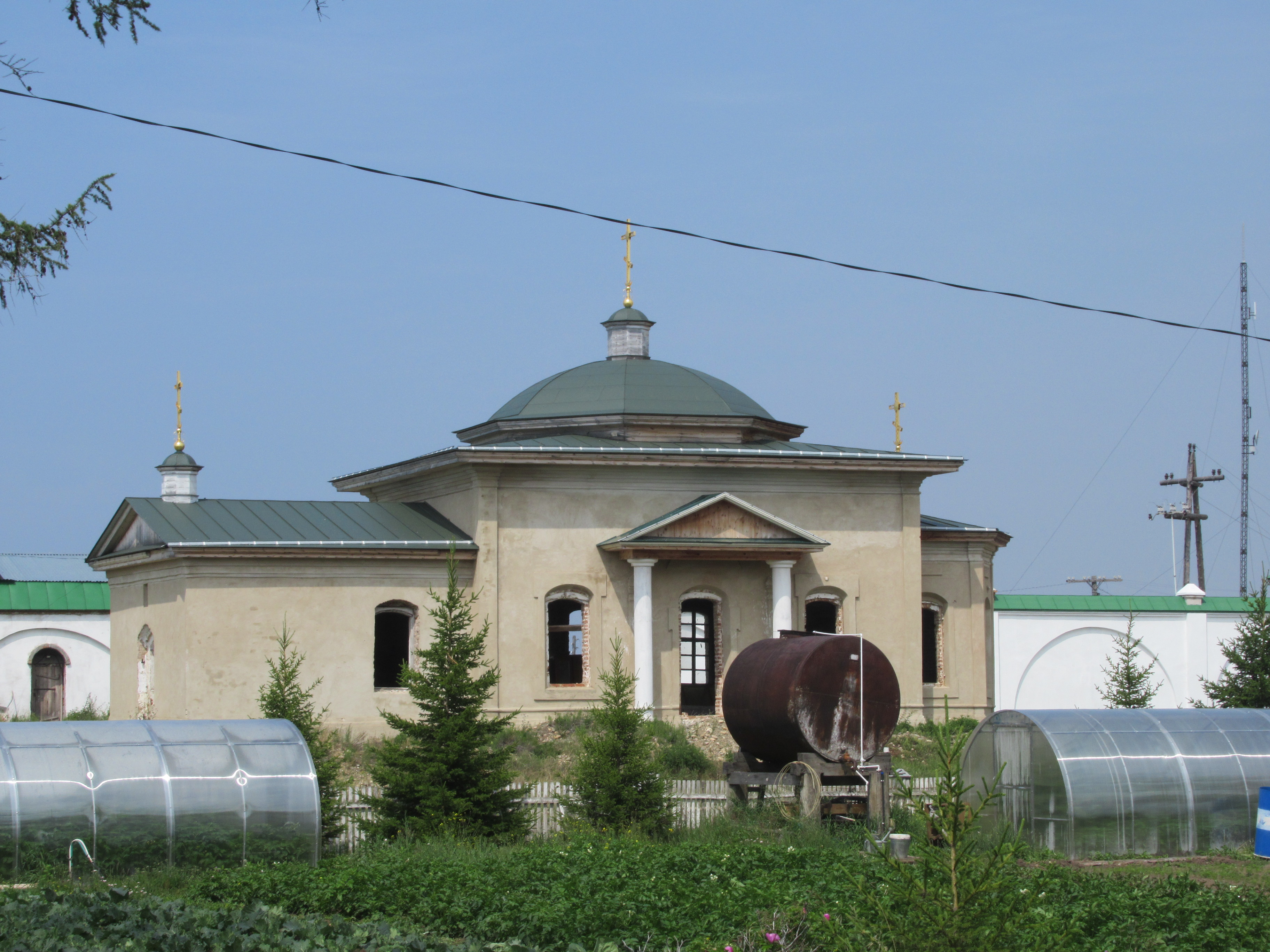 Церковь святителя Николая: Посольское, Кабанский район, Бурятия